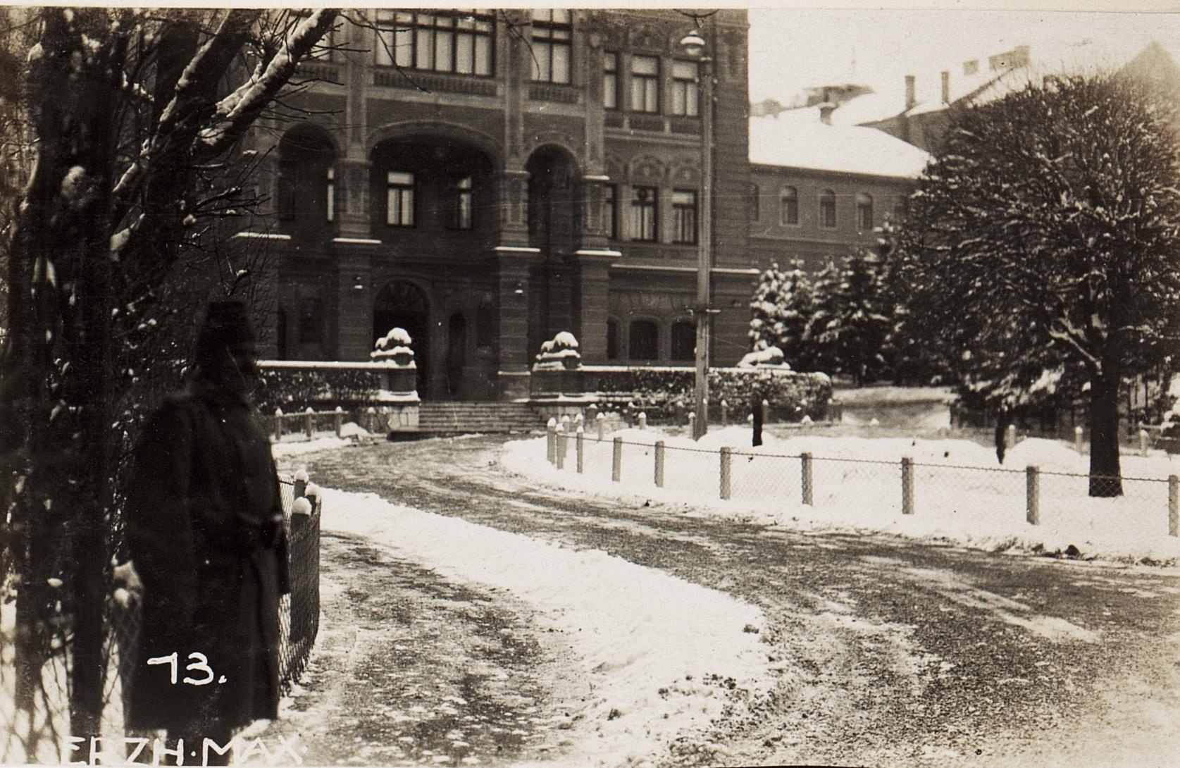 Konak in Sarajevo.